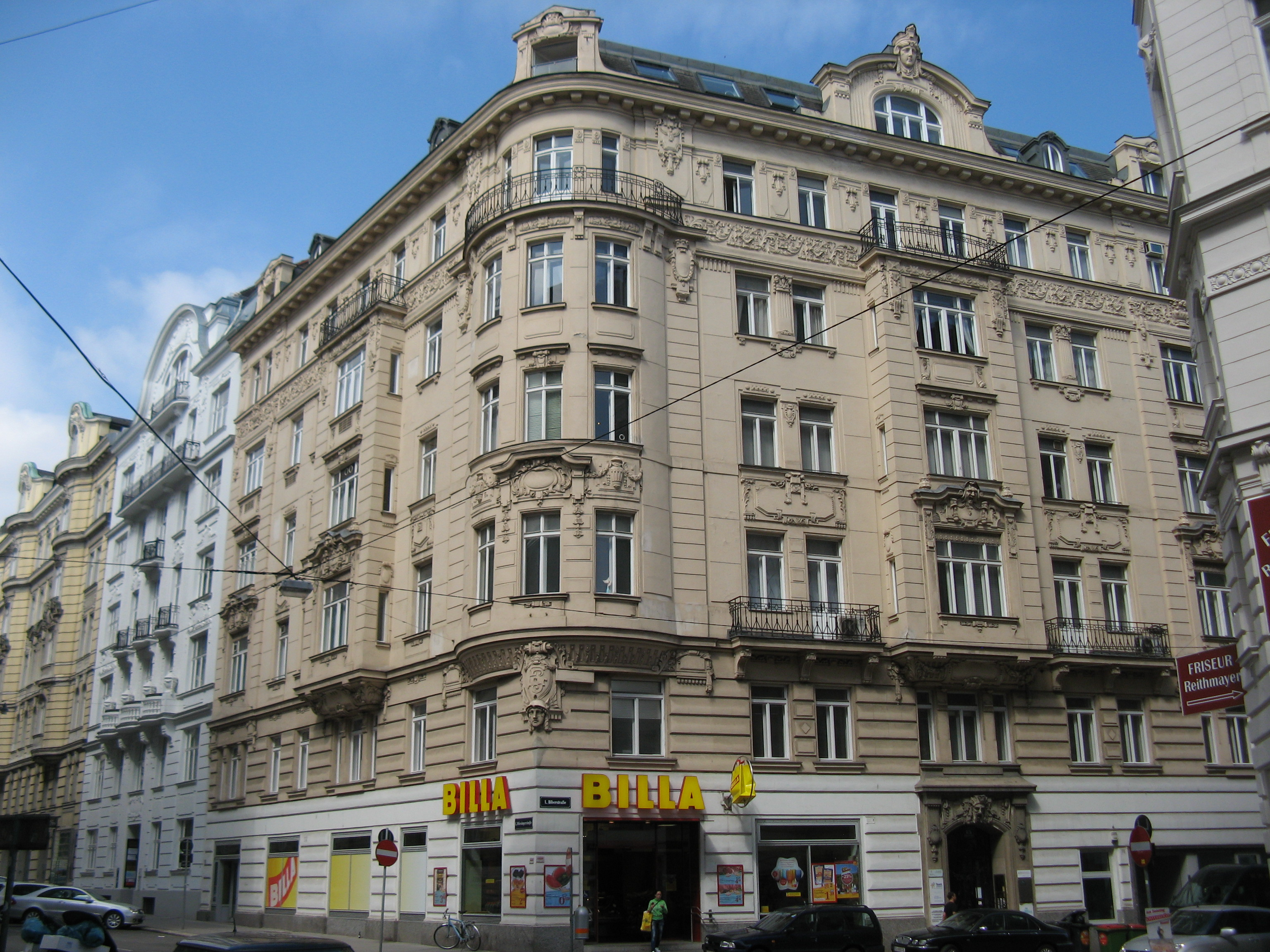 Haus Biberstraße Nr. 15 von M. Löw (1905), Wien-Innere Stadt